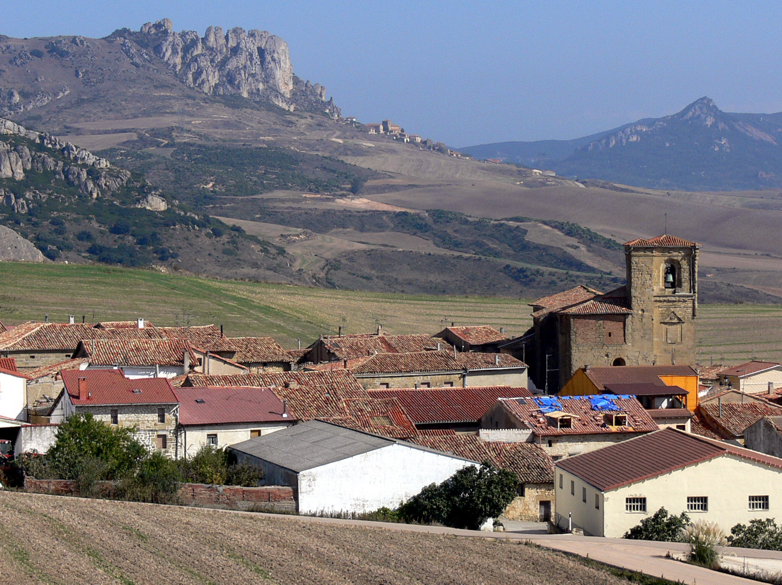 Vista general de Foncea, La Rioja - España.